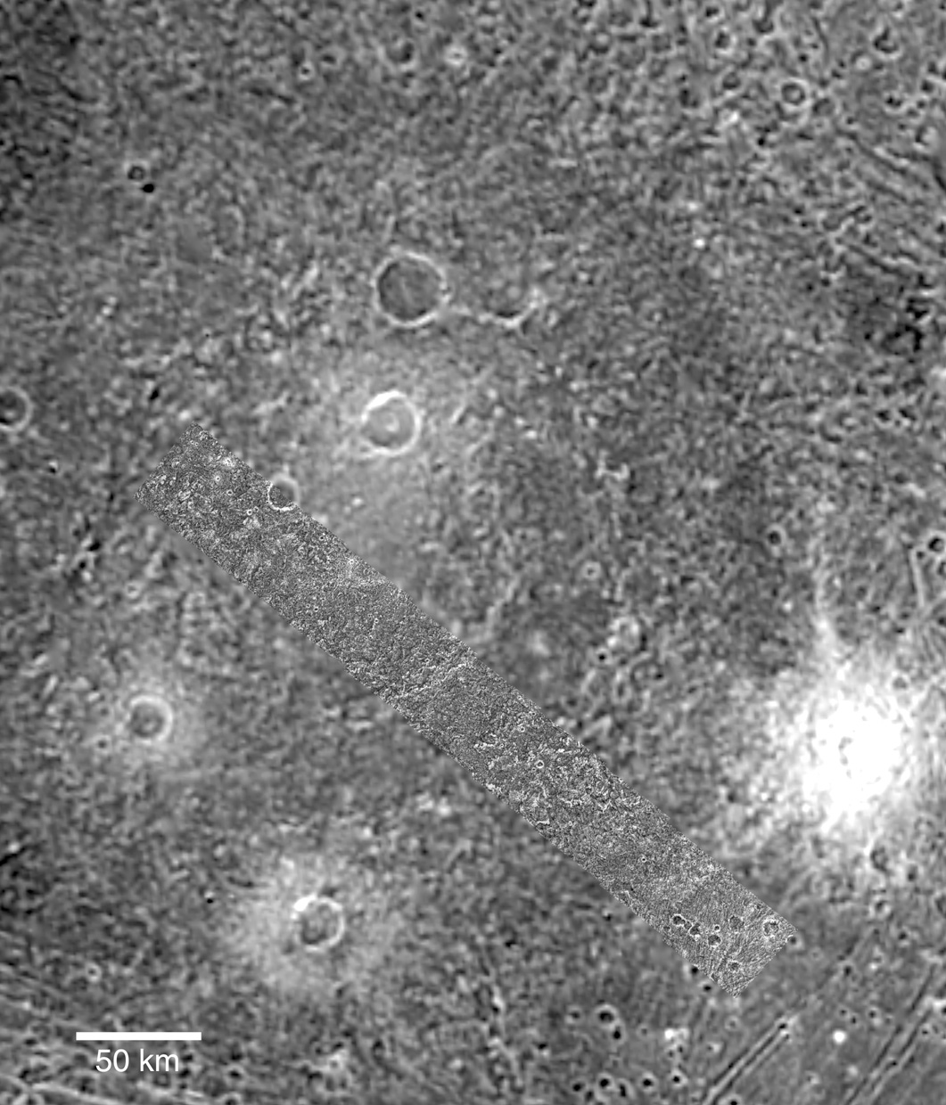 Кратер Эпигеус на спутнике Юпитера Ганимеде